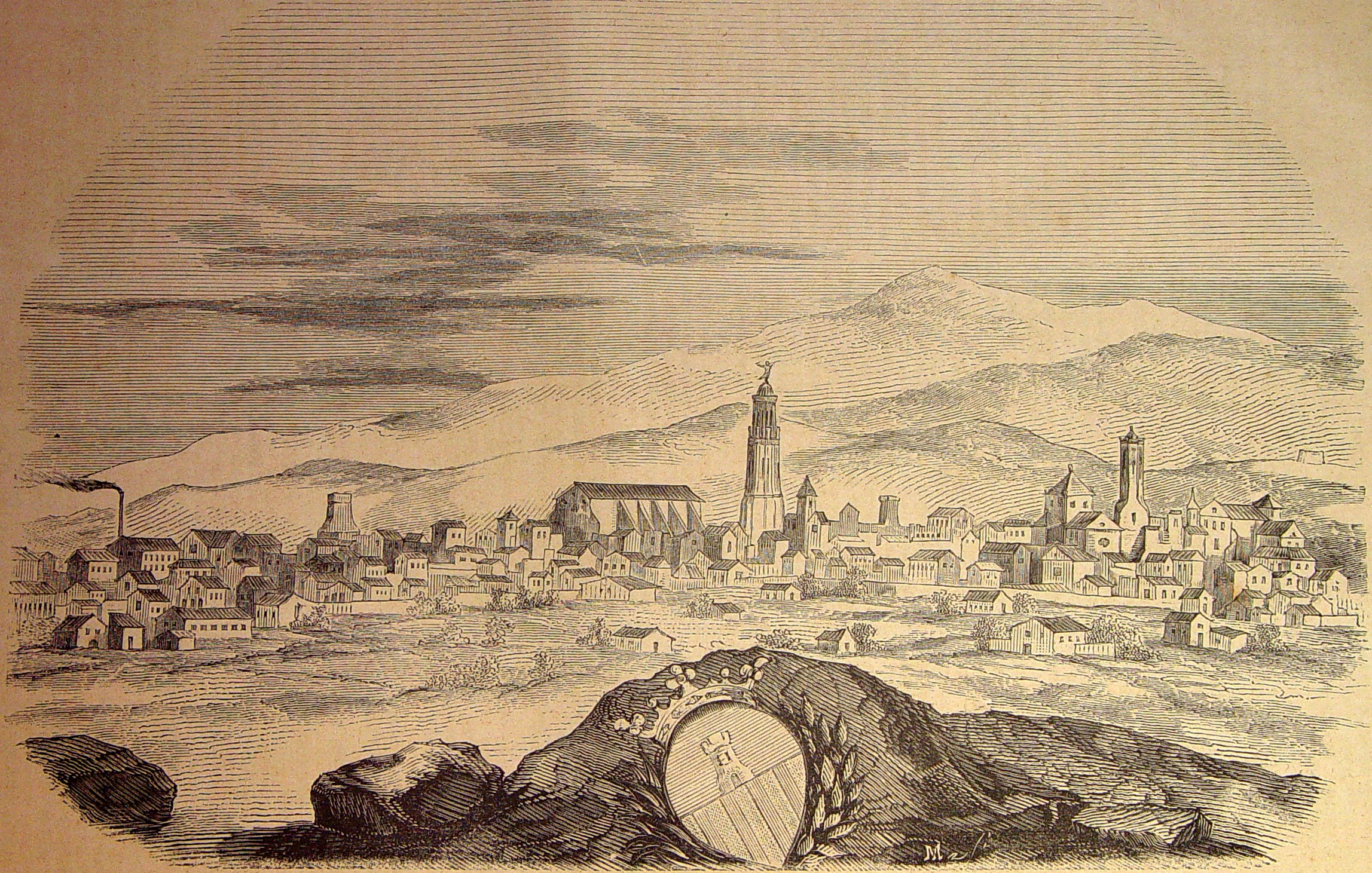 "Villanueva y Geltrú". Ilustraciones pertenecientes al libro: Las glorias nacionales : grande historia universal de todos los reinos, provincias, islas y colonias de la Monarquía Española, desde los tiempos primitivos hasta el año de 1852. - Madrid [etc.] (Barcelona : Imprenta de Luis Tasso) Librería de la Publicidad [etc.], 1852-1854.